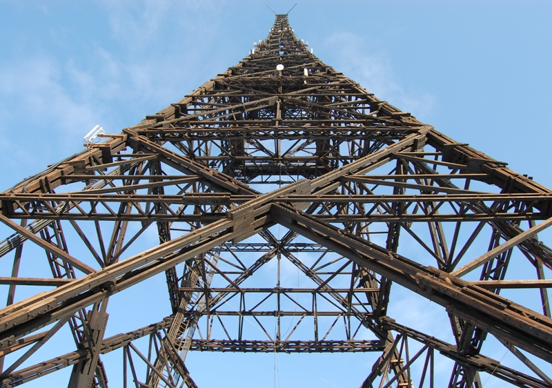 Gliwice Drewniana wieza Radiostacji widziana z bliska